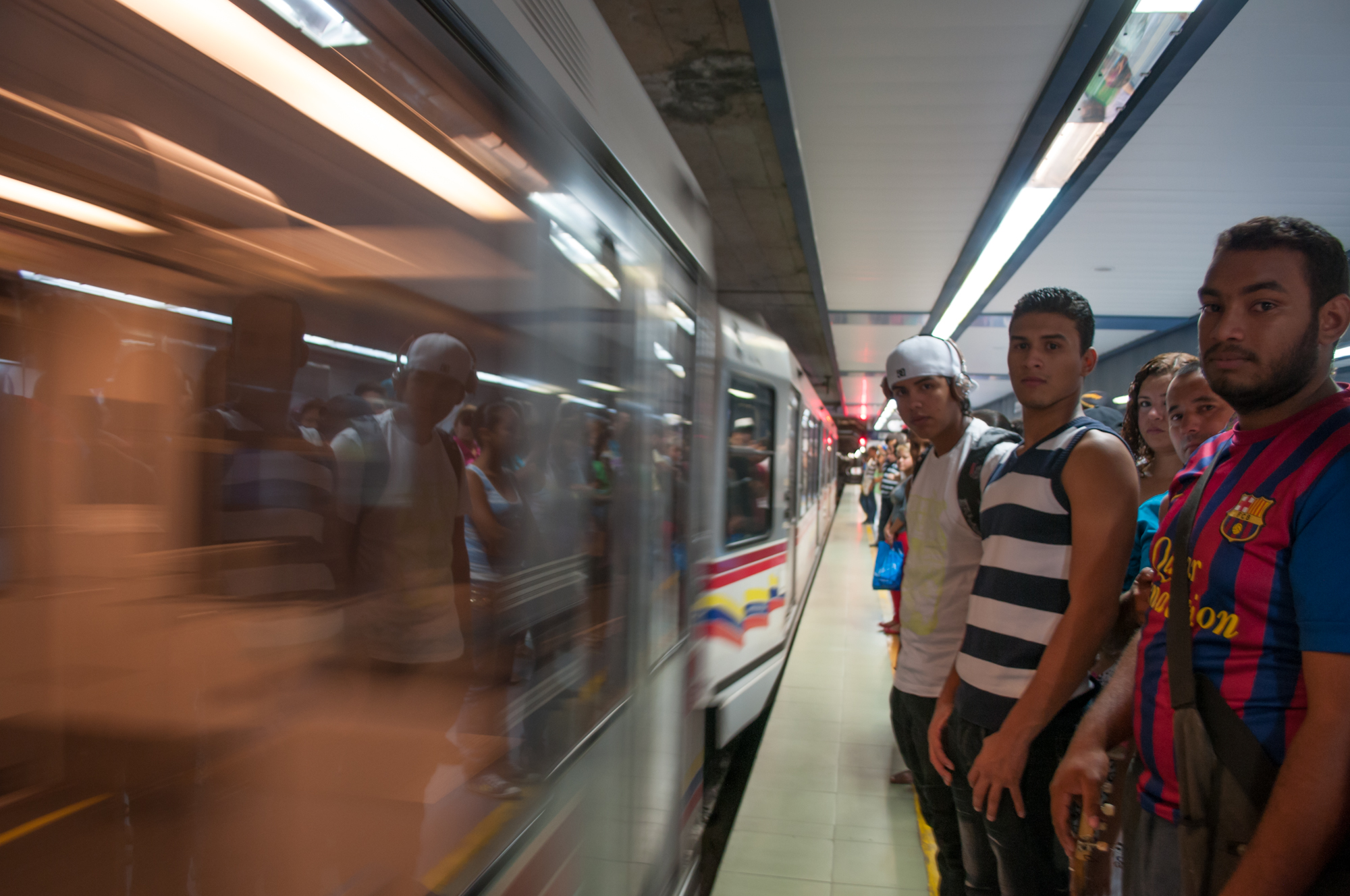 Abordando el Metro de Valencia